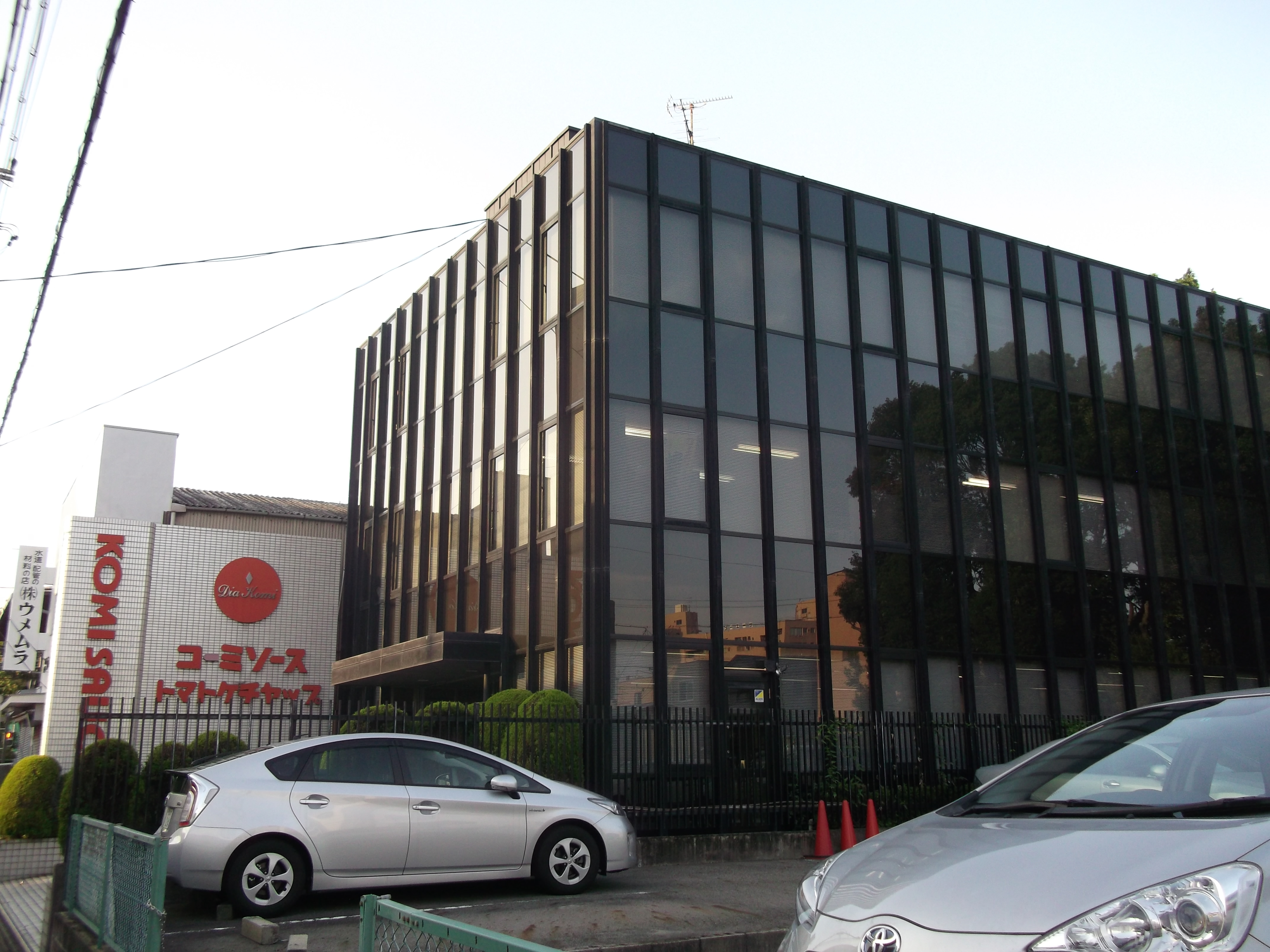 名古屋市東区芳野のコーミ本社を西側公道南側より撮影